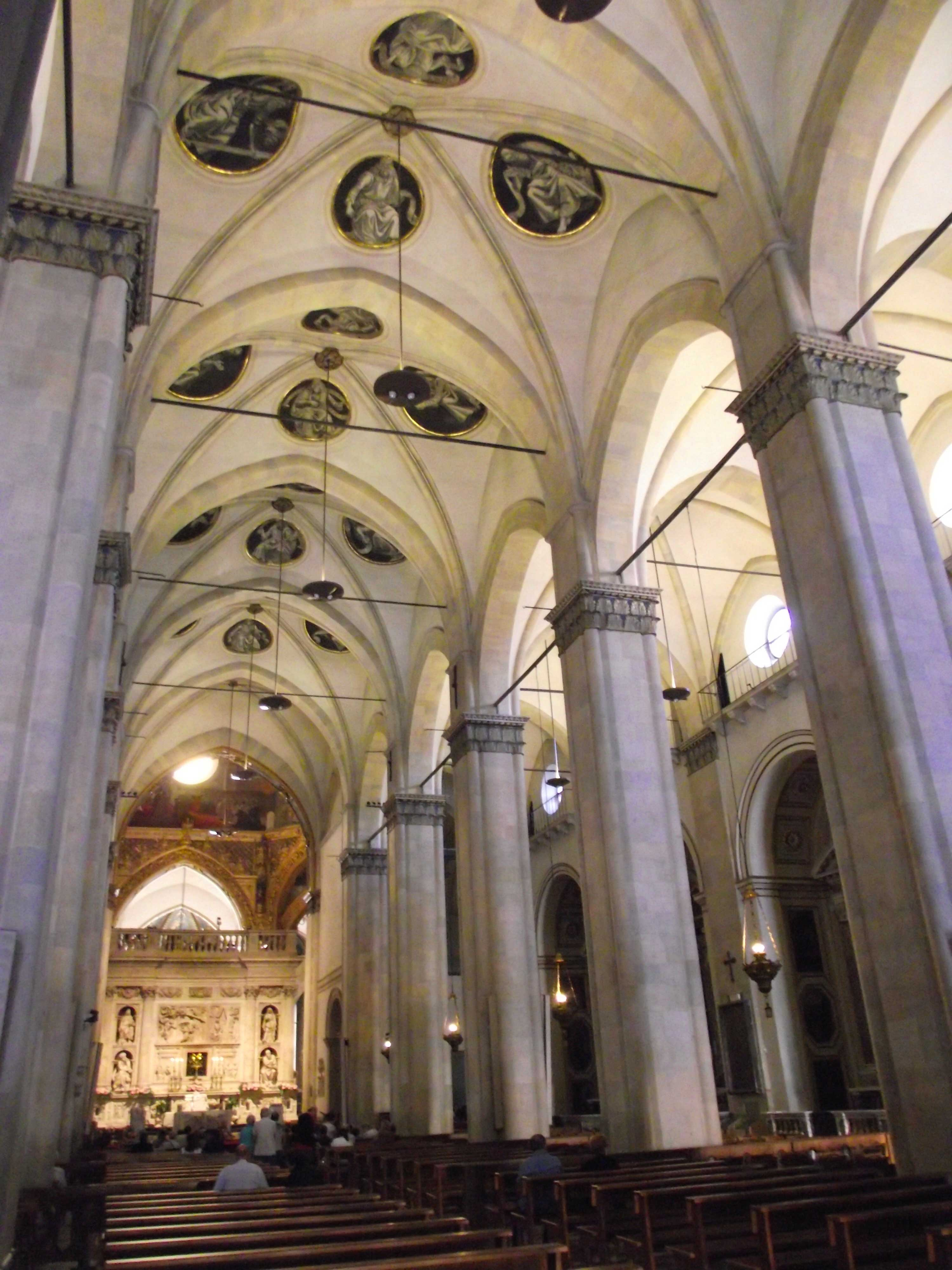 Loreto, Basilica della Santa Casa